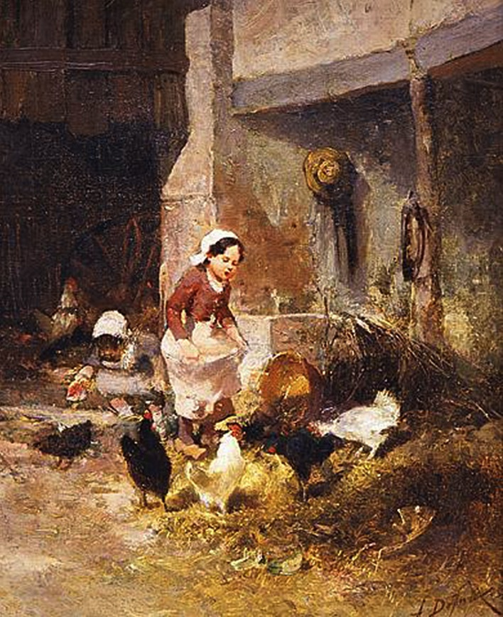 L'heure-du-grain